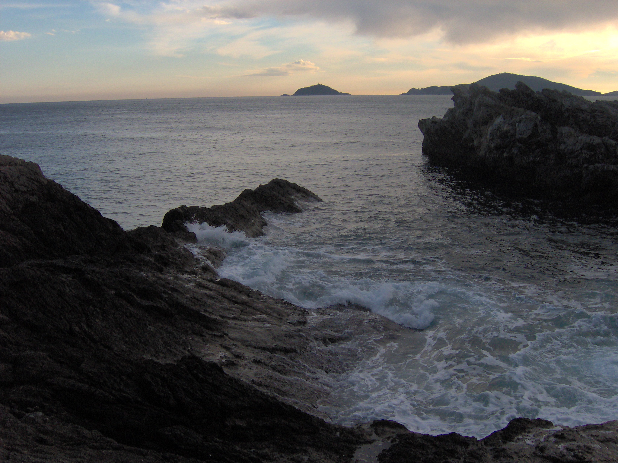 Isola del Tino vista da Tellaro